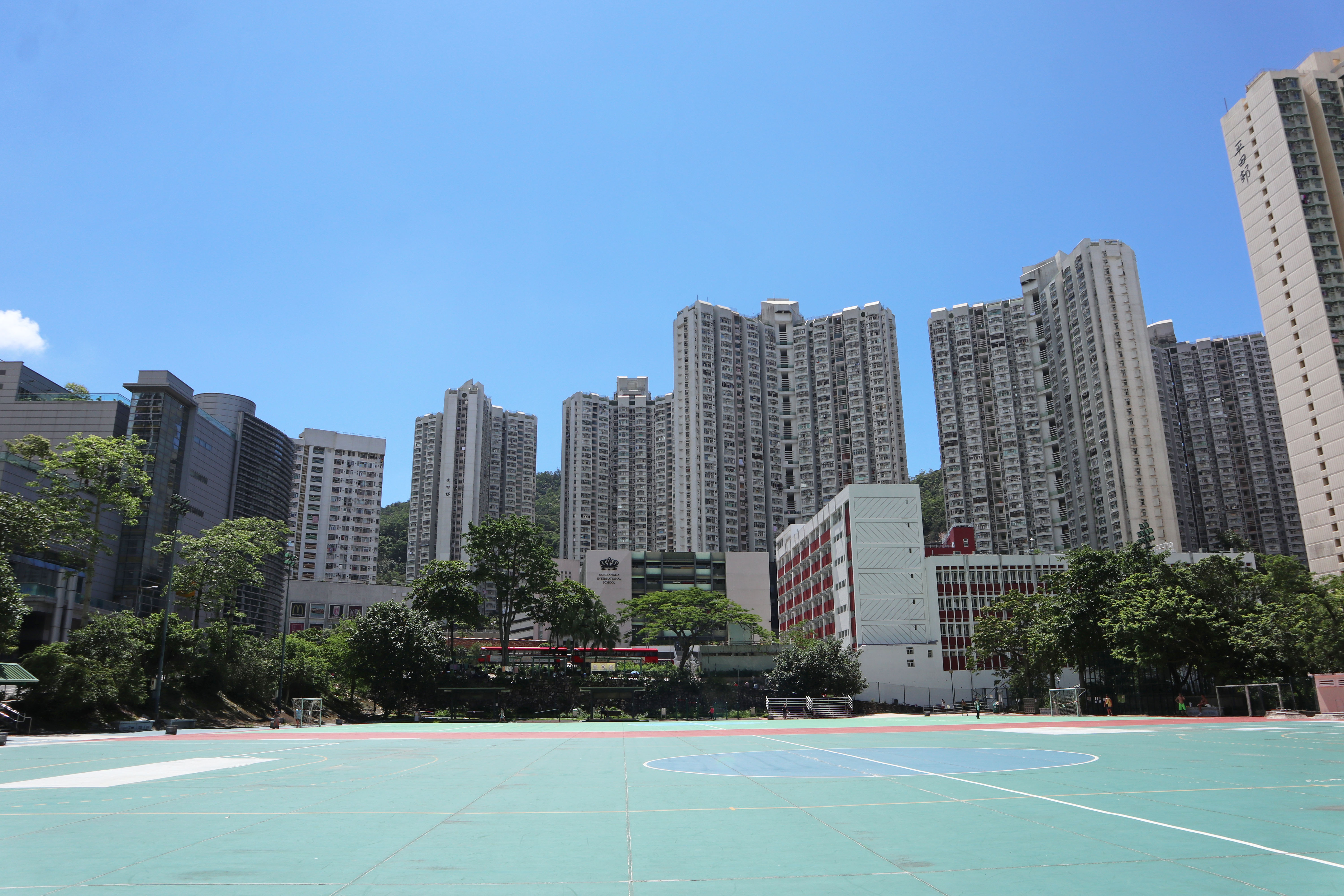 藍田德田邨外觀